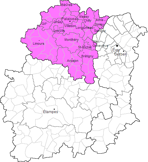 Carte des communes de l'arrondissement de Palaiseau (91)